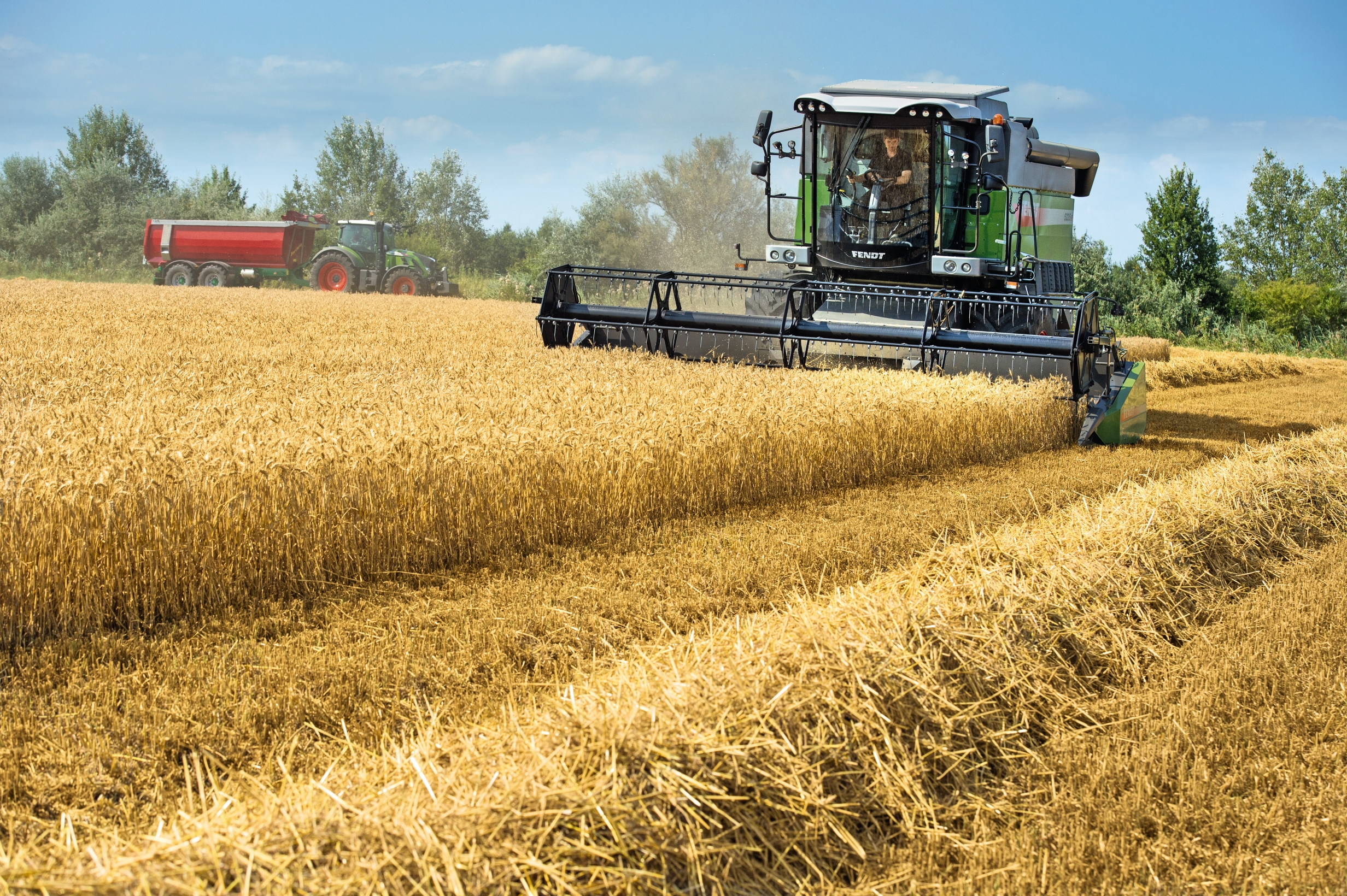 Fendt E-Serie